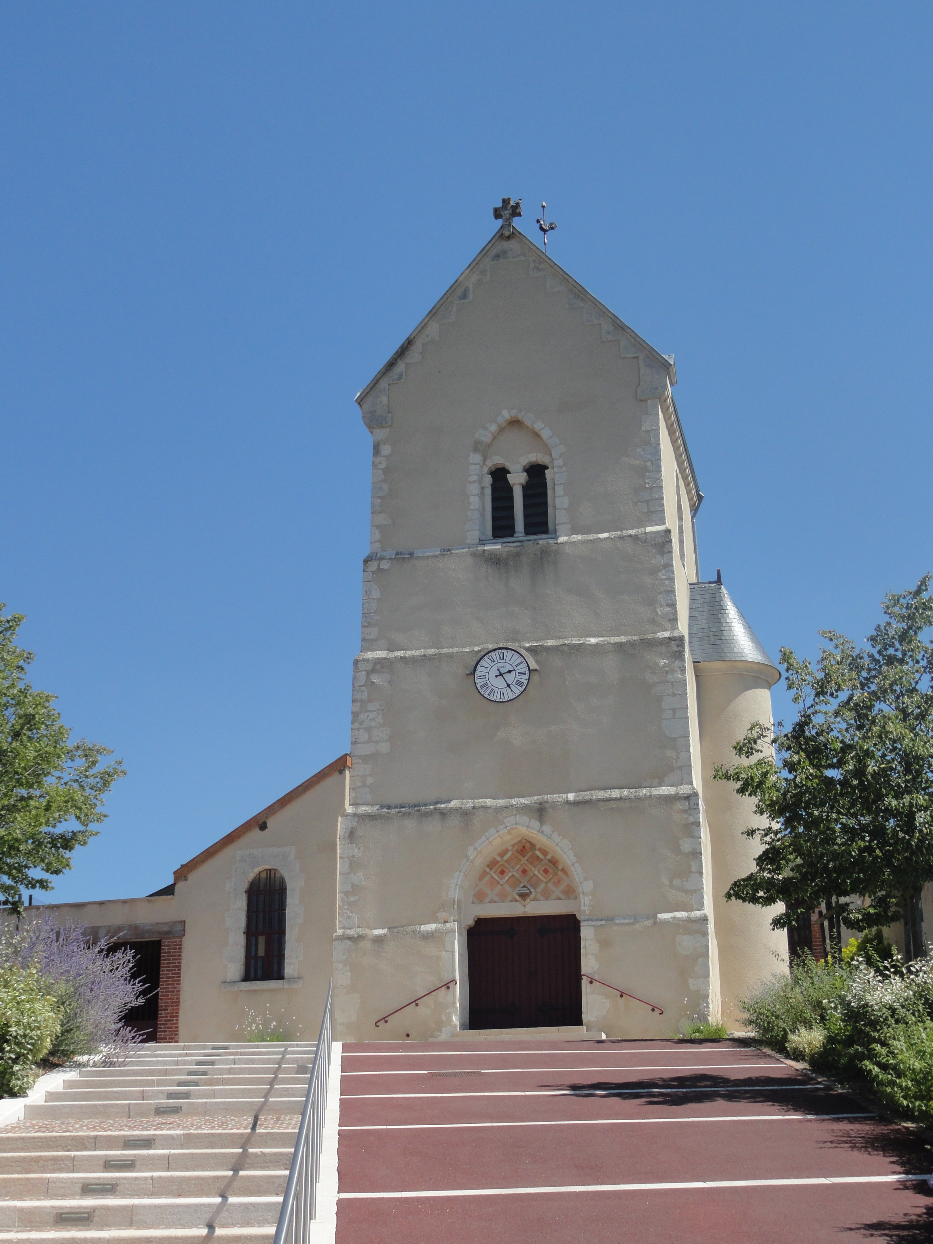 Eglise Saint Timothée de Dizy (Marne).